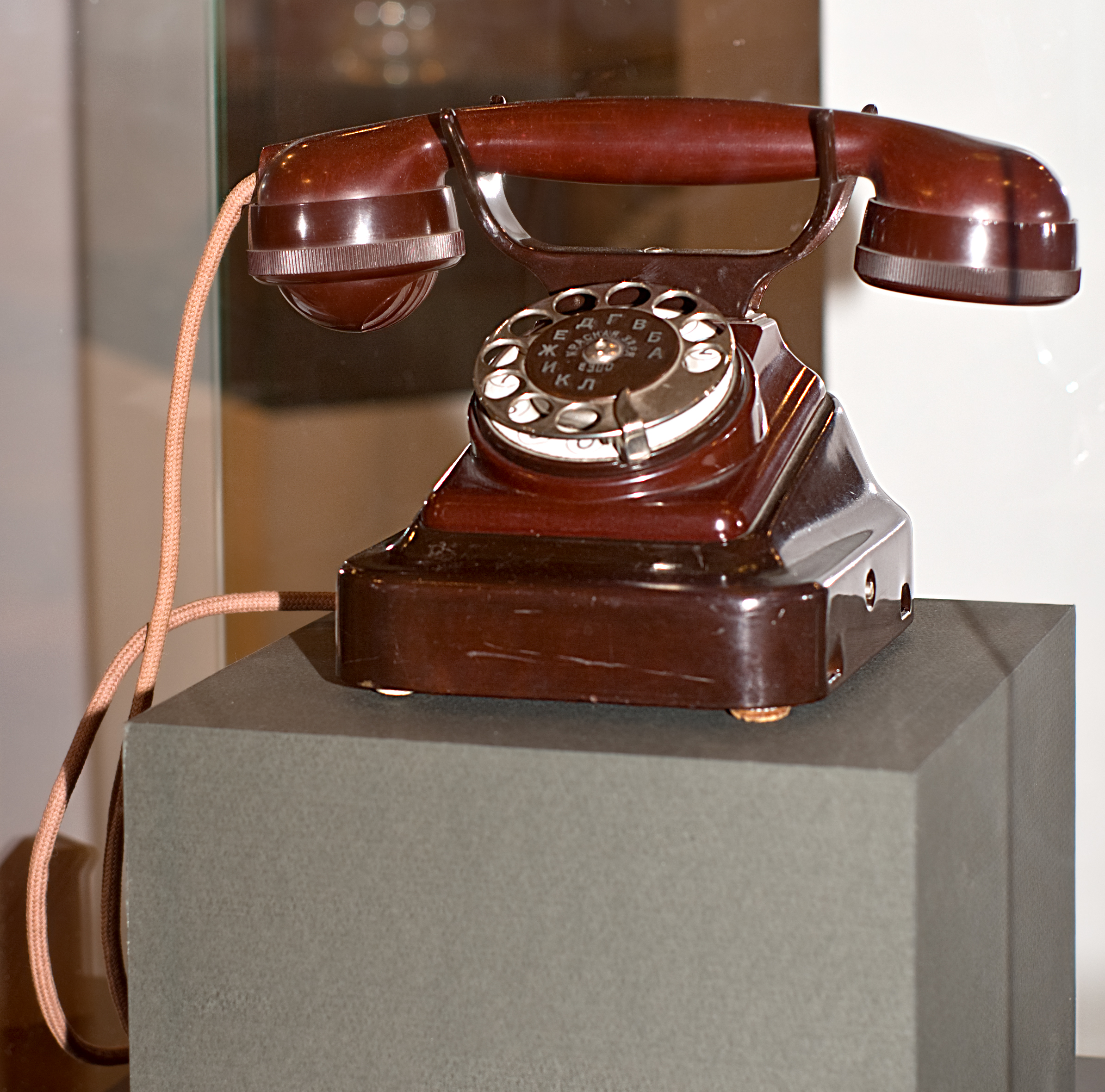 Телефонный аппарат, 1930ые